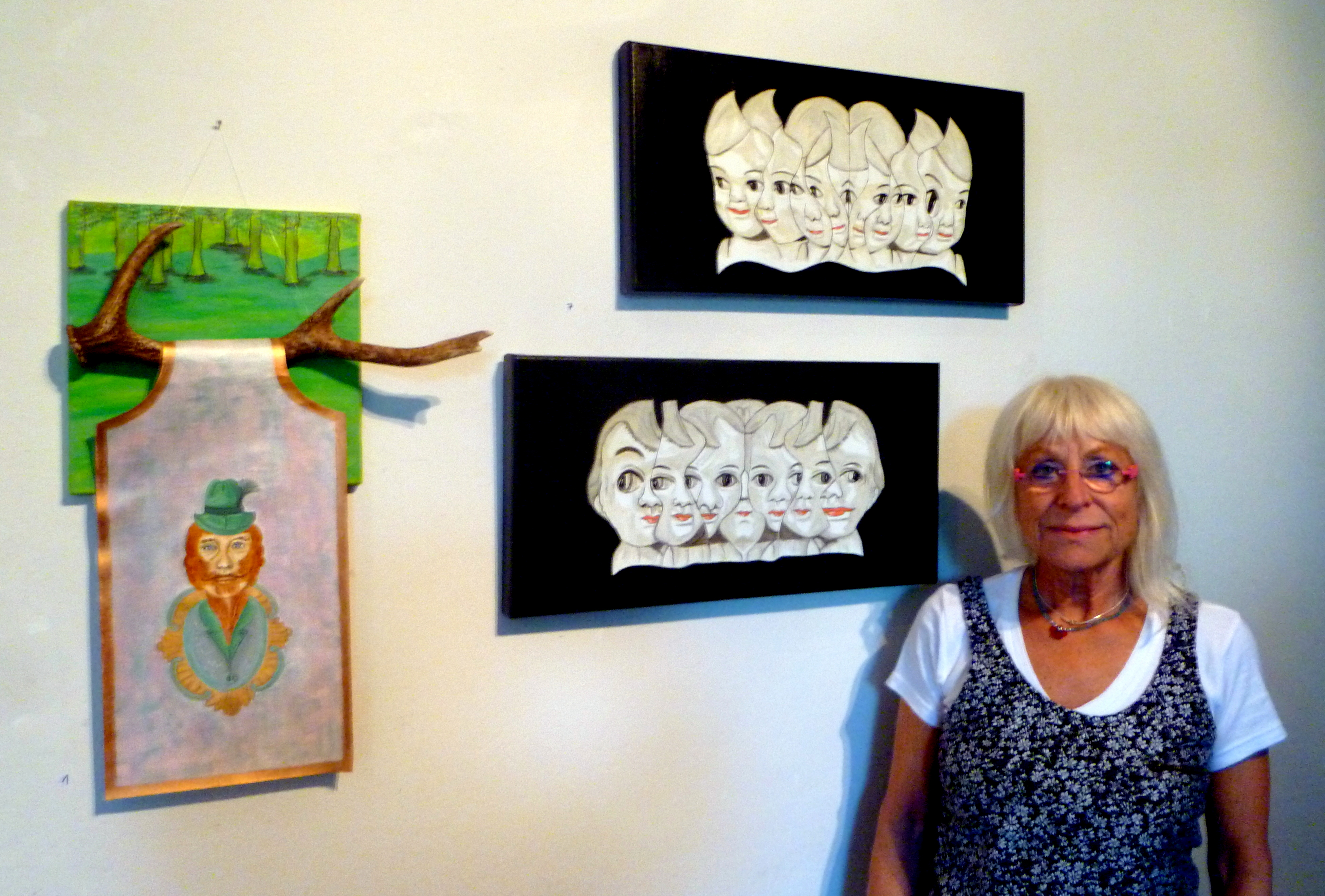 Christiane Denés im Haus Matthéy anlässlich der Vernissage zur Aachener Kunstroute am 23. September 2017